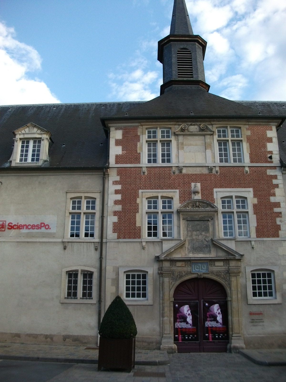 Ancien Collège des Jésuites de Reims, place Museux, l'entrée qui sert aussi au campus de Sciences Po.